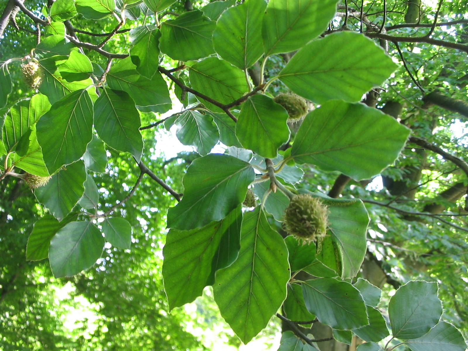 гілка бука європейського з горішками